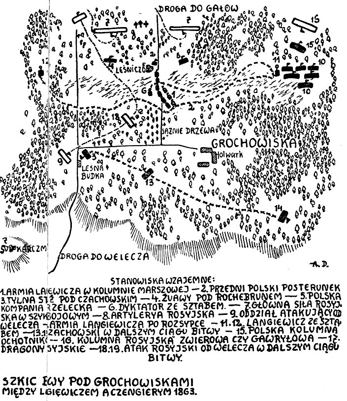 Plan Bitwy pod Grochowiskami dnia 1863.03.18